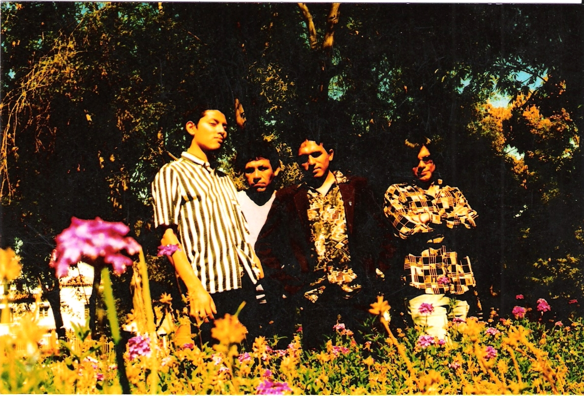 Comfuzztible (Garage Rock Band)